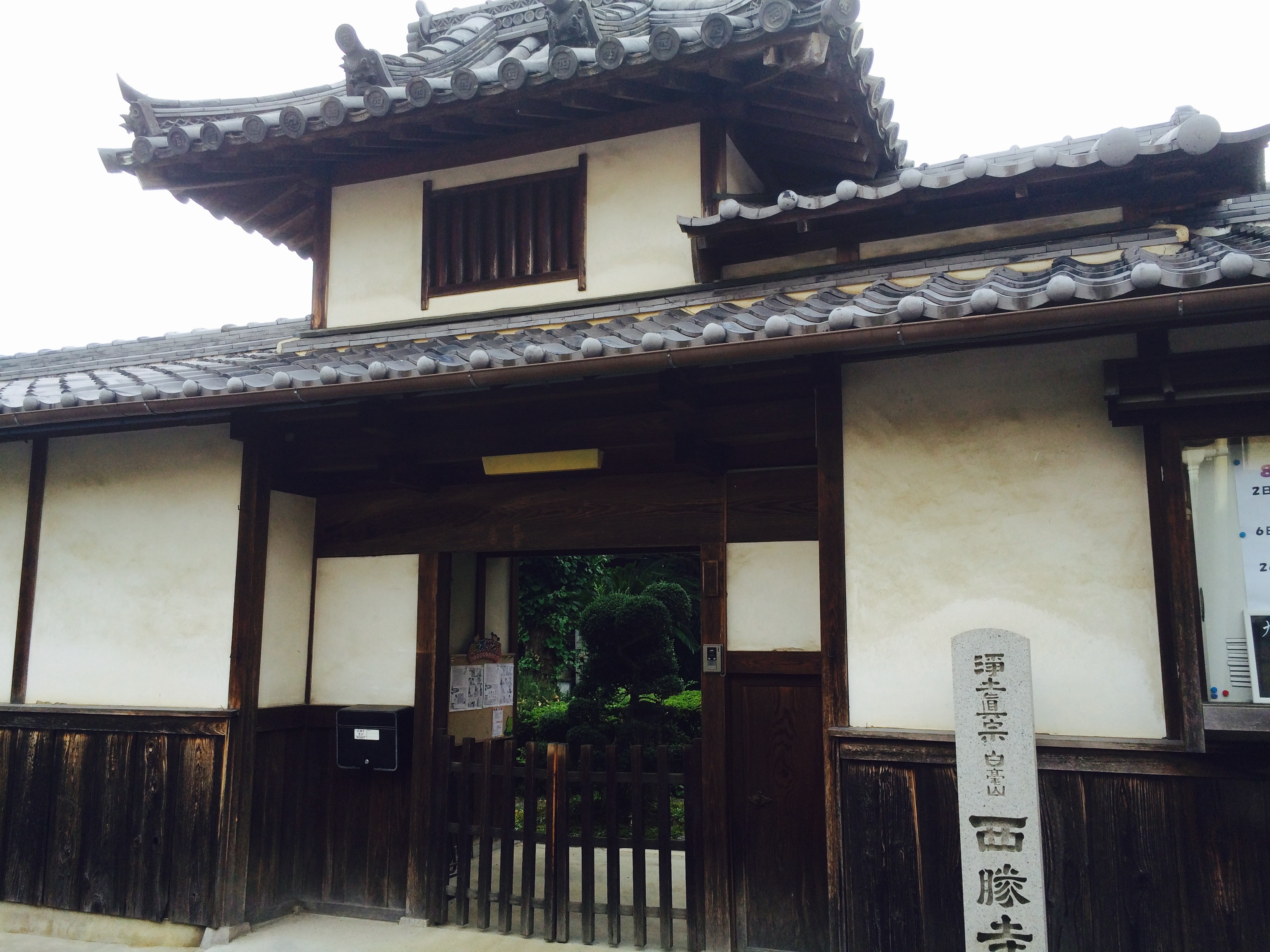 奈良市西勝寺